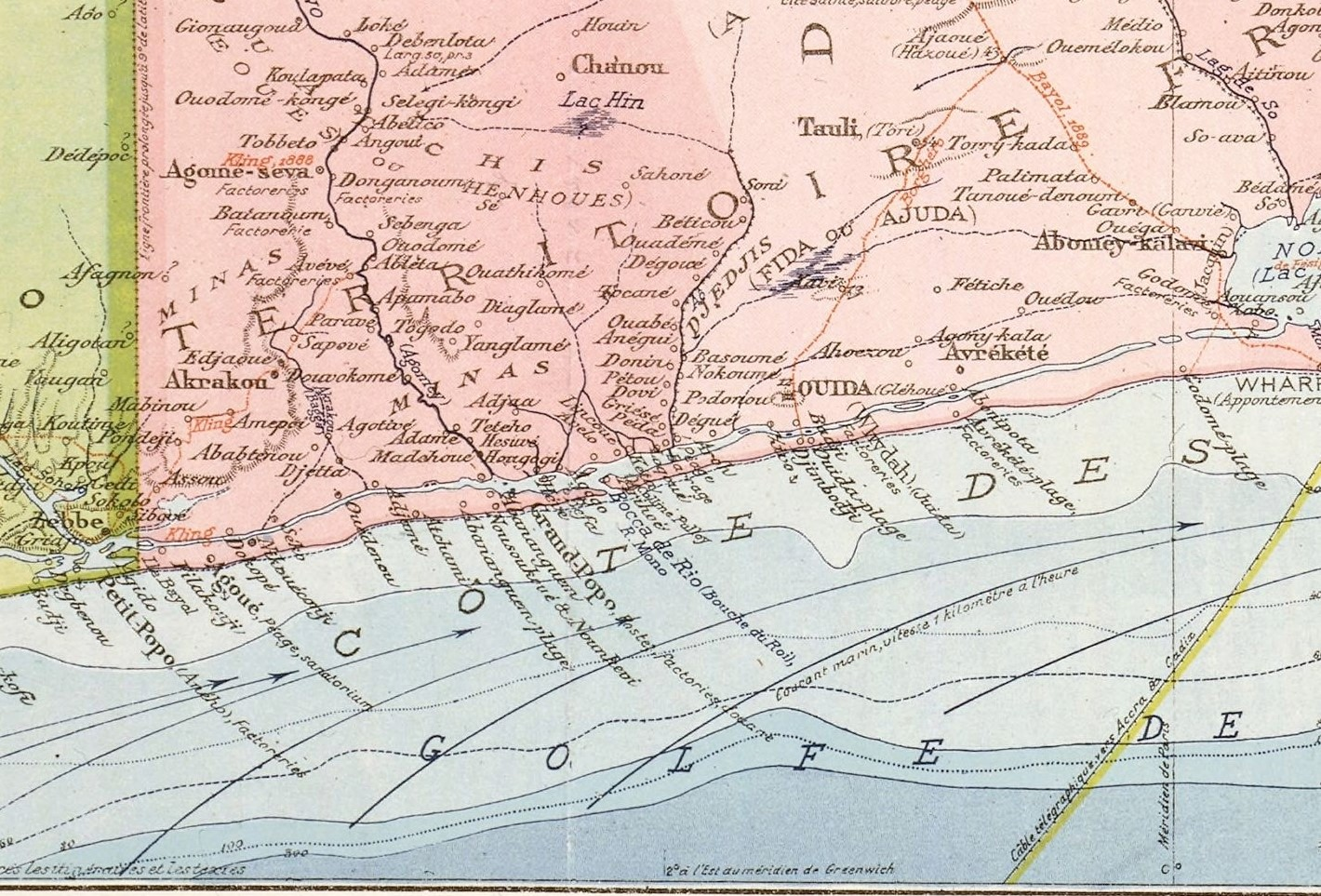 Western Slave Coast. Left: Little Popo and the borderline of German Togoland and French Dahomey. Middle: Grand-Popo and Ouidah. Right: Cotonou.